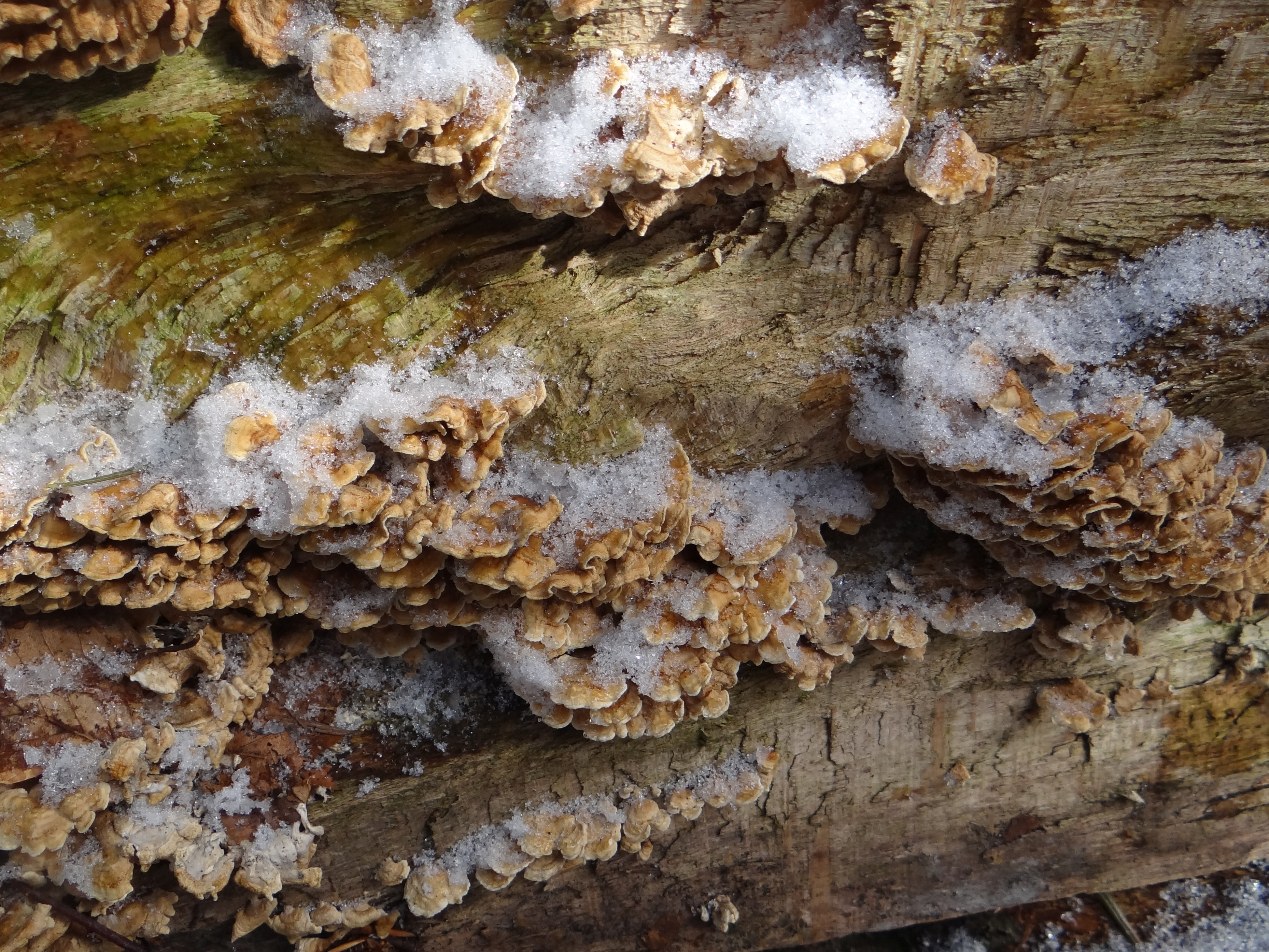 Plicaturopsis crispa. Location: Poland, Beskid Wyspowy, Pasierbiecka Góra